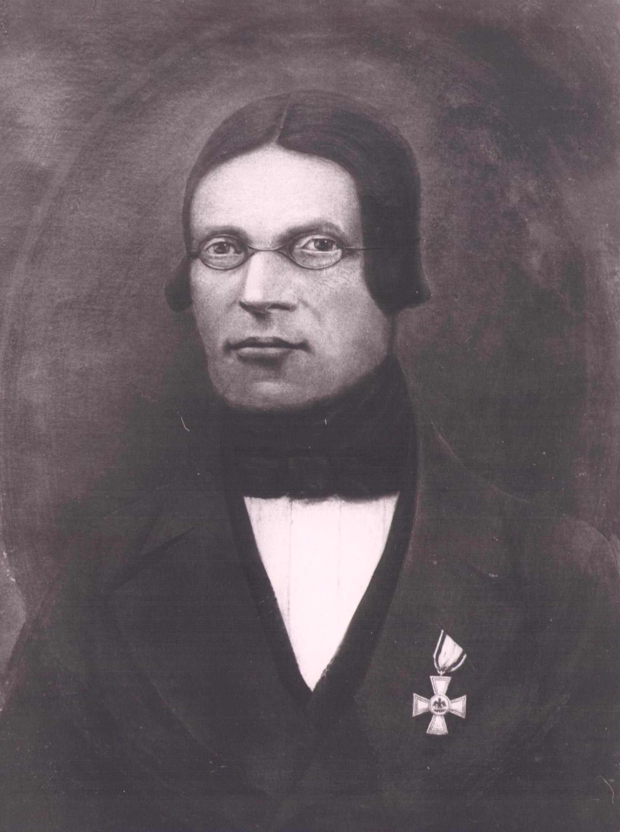 Porträt des Agrarwissenschaftlers Carl Sprengel (1787–1859)